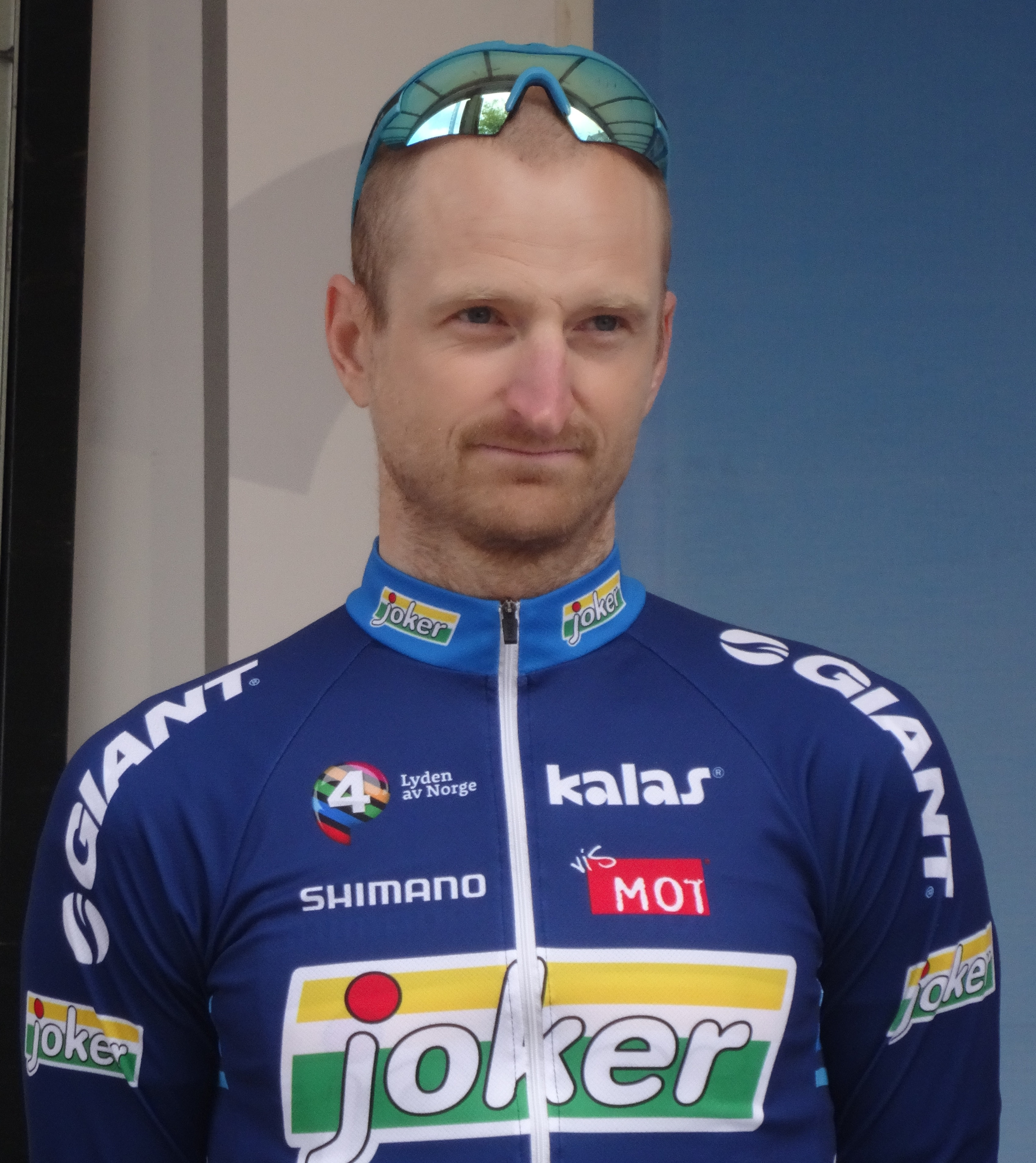 Reportage photographique réalisé le mercredi 27 août à l'occasion du départ de la Druivenkoers Overijse 2014 à Huldenberg, Belgique.